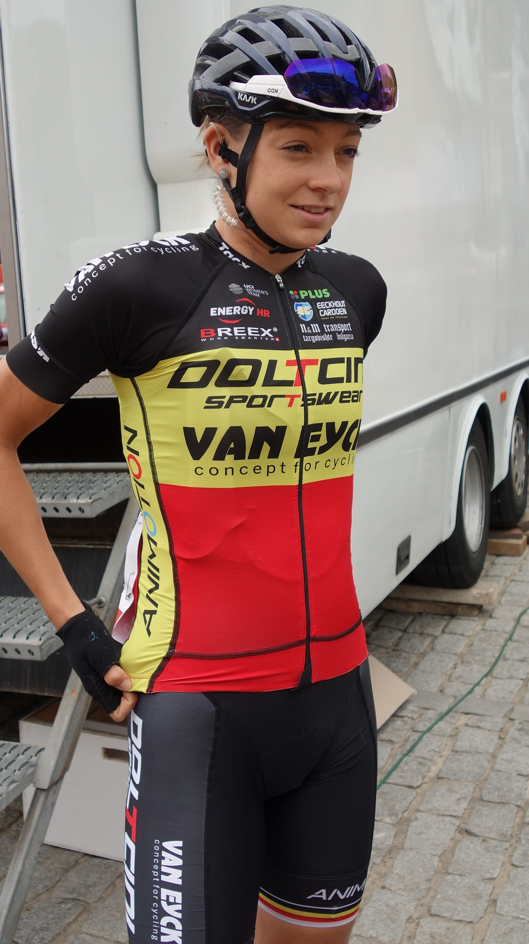 Start van de laatste etappe in Geraardsbergen van de Lotto Belgium Tour 2019